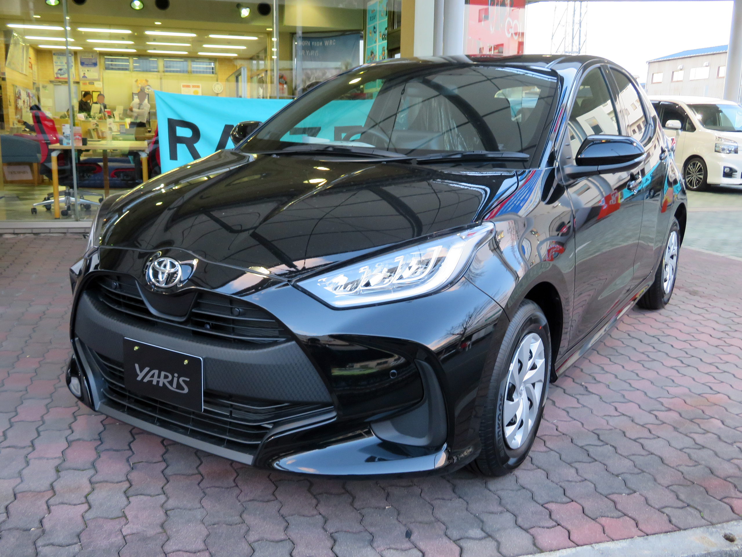 5BA-MXPA10-AHXGB型トヨタ・ヤリス1.5G 2WD・CVTをフロントから撮影。